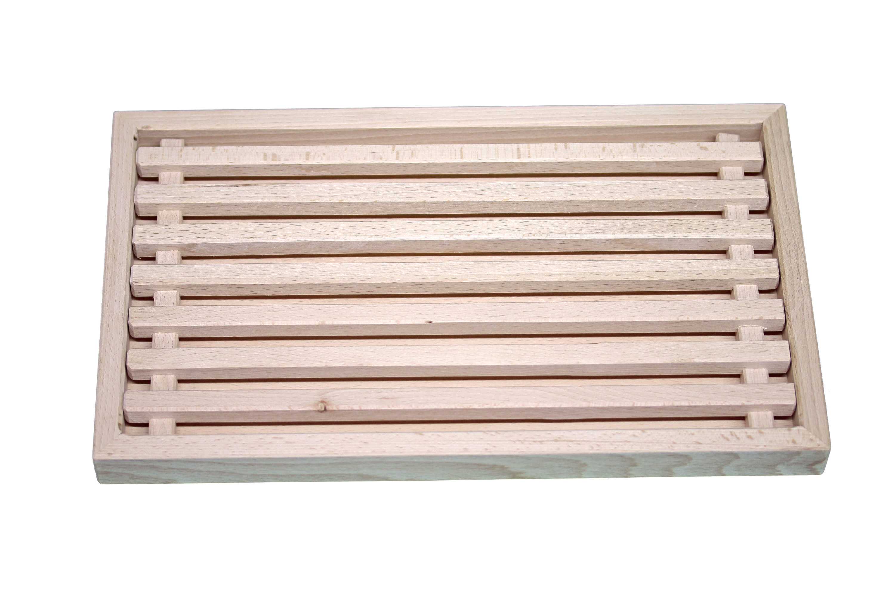 Brotbrett